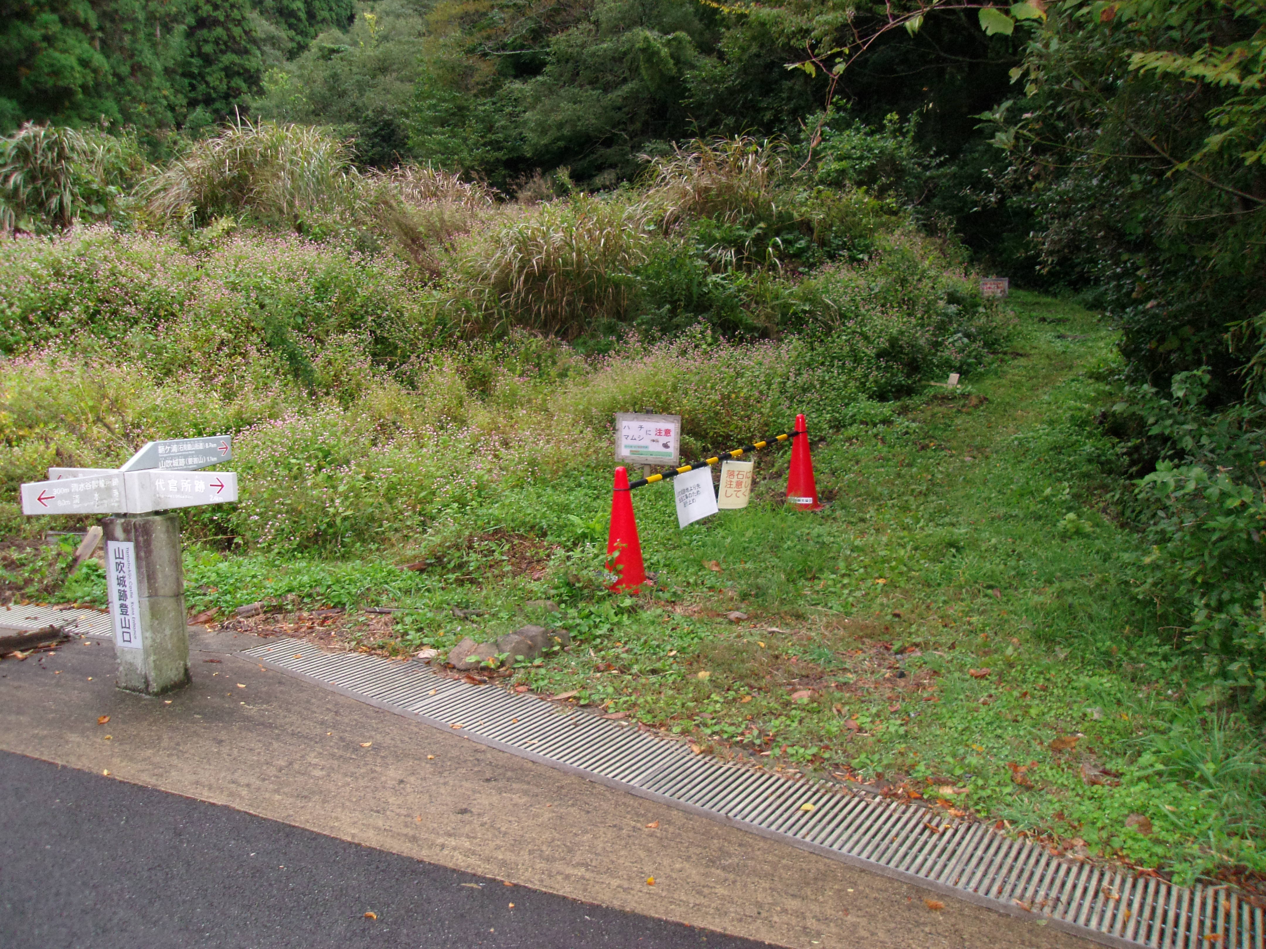 世界遺産「石見銀山」の構成資産である銀山街道鞆ヶ浦道 山吹城跡登山道入り口が銀山街道鞆ヶ浦道の導入部でもある